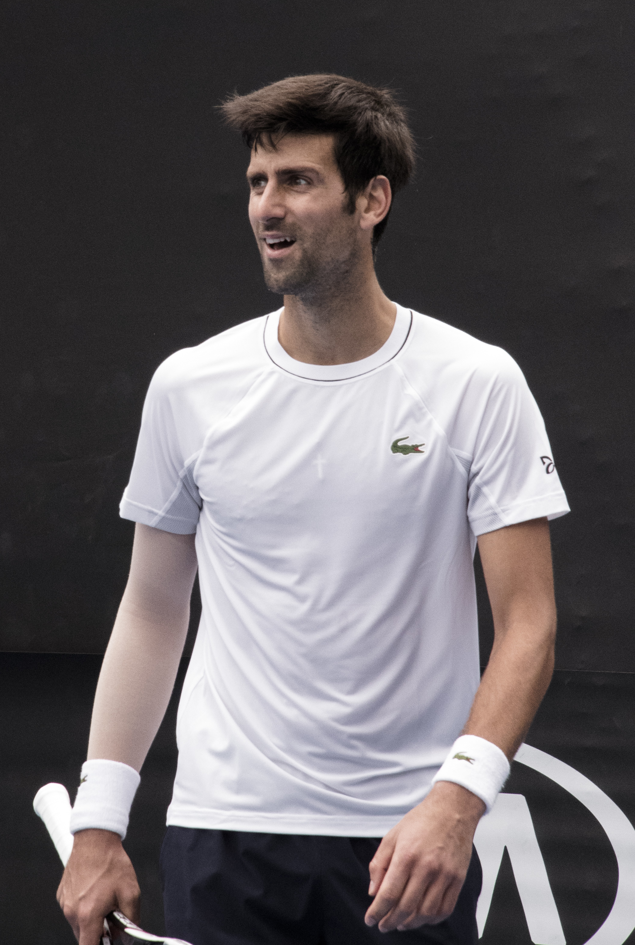 Novak Djokovic (Ser)